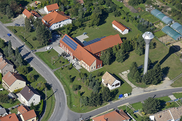 Vép városa légi felvételen